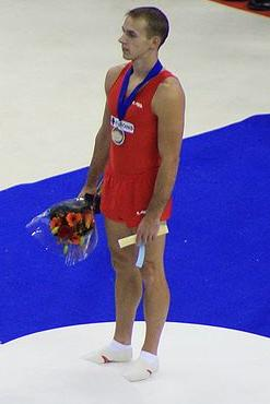 Flavius no pódio do salto no Mundial de Londres em 2009